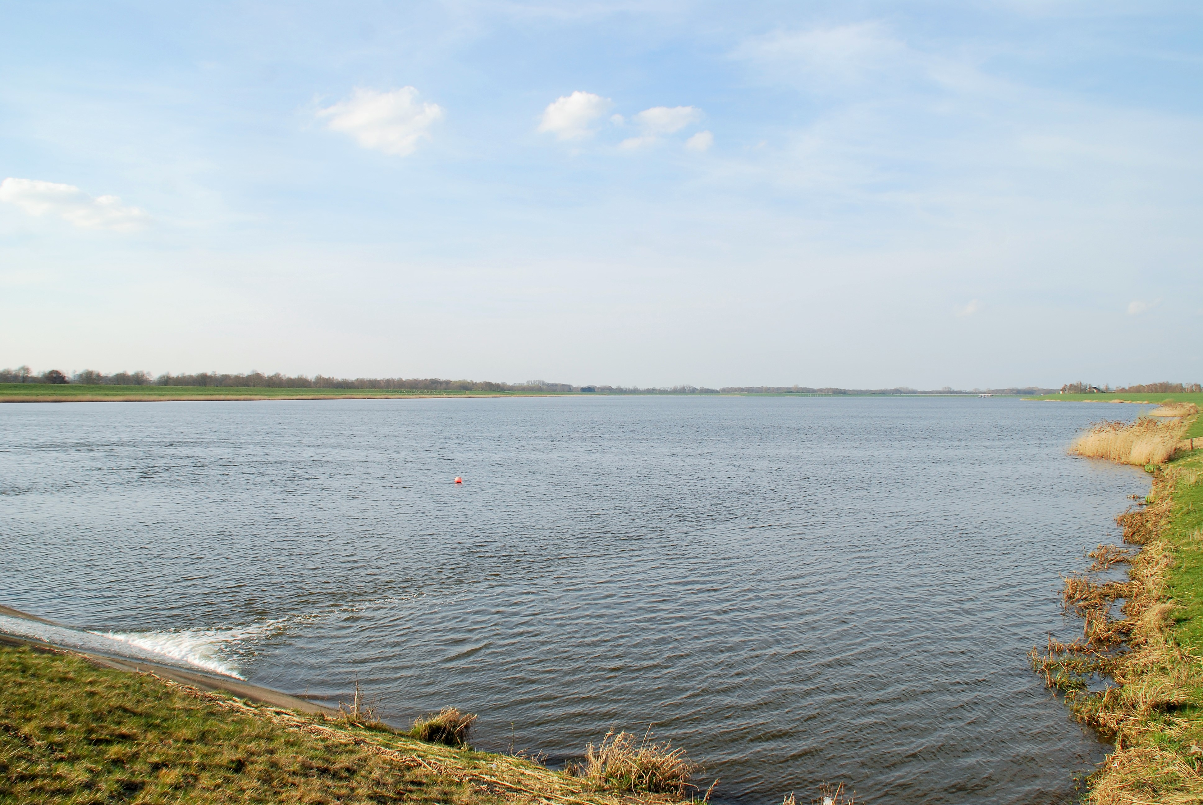 Blick über den Alfsee von Süden aus.